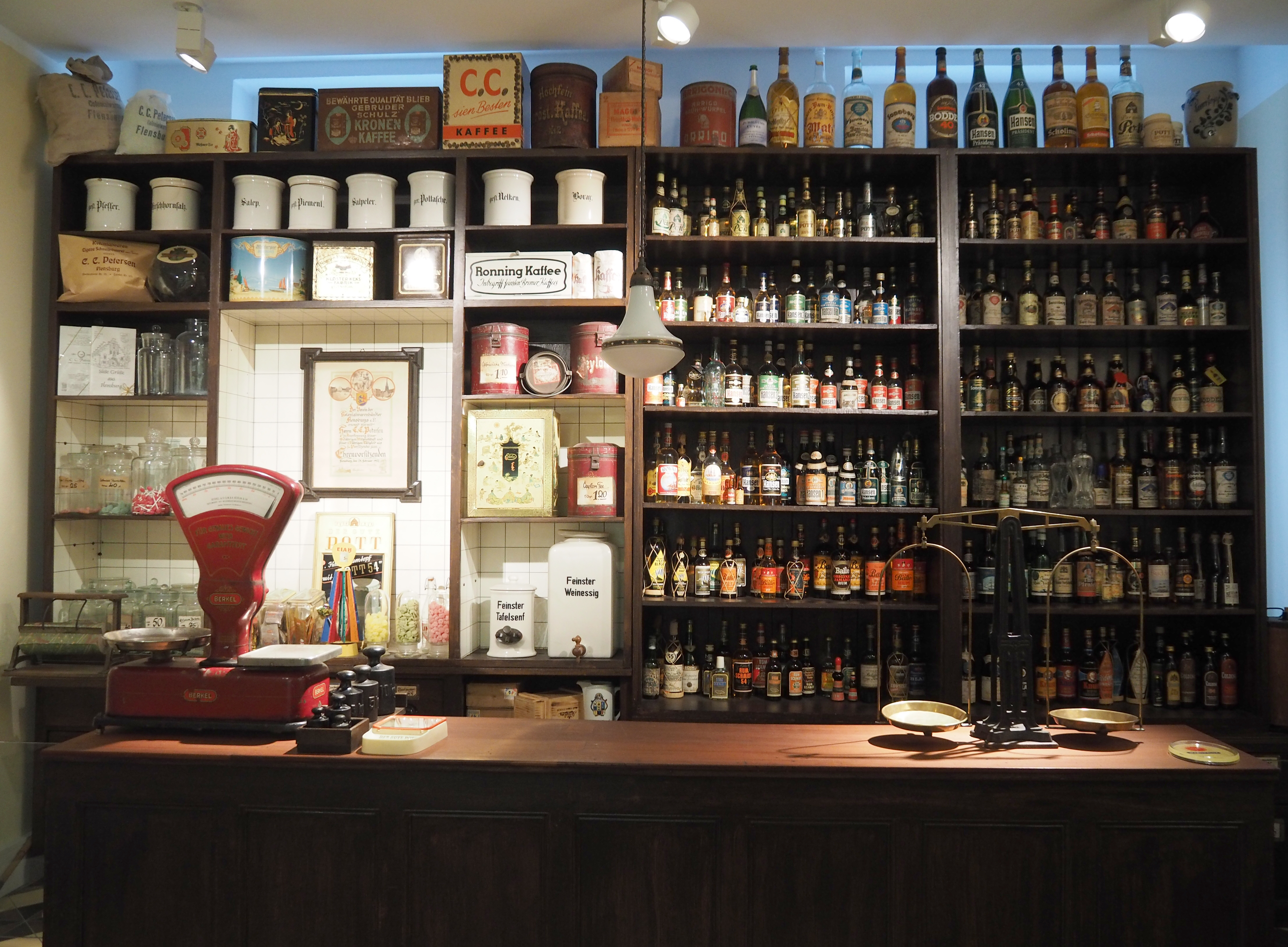 Kolonialwarenladen von Carsten Christian Petersen, Flensburg (Ladeneinrichtung von 1894) im Schifffahrtsmuseum Flensburg.